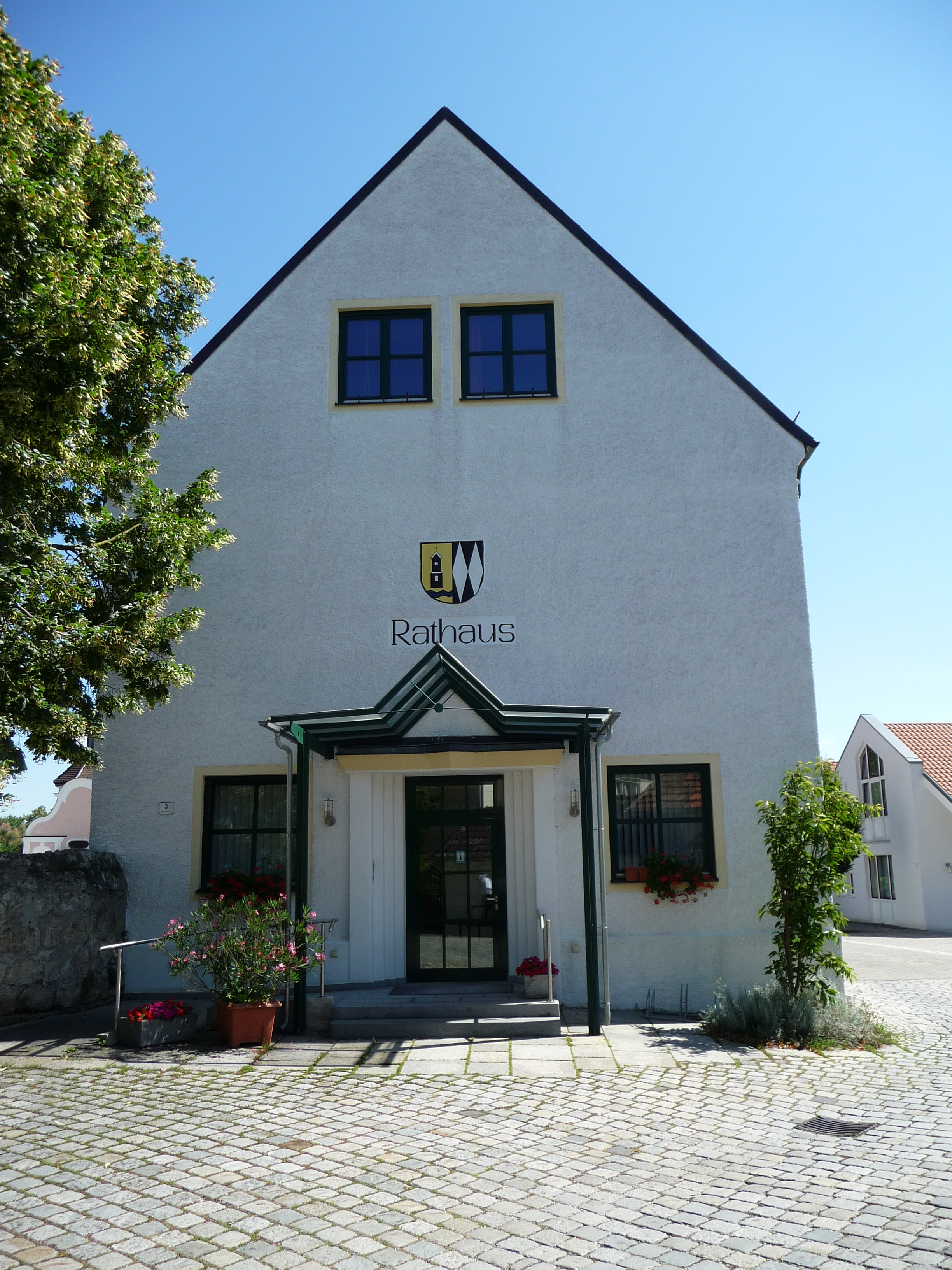 Das Rathaus von Kirchham, Landkreis Passau